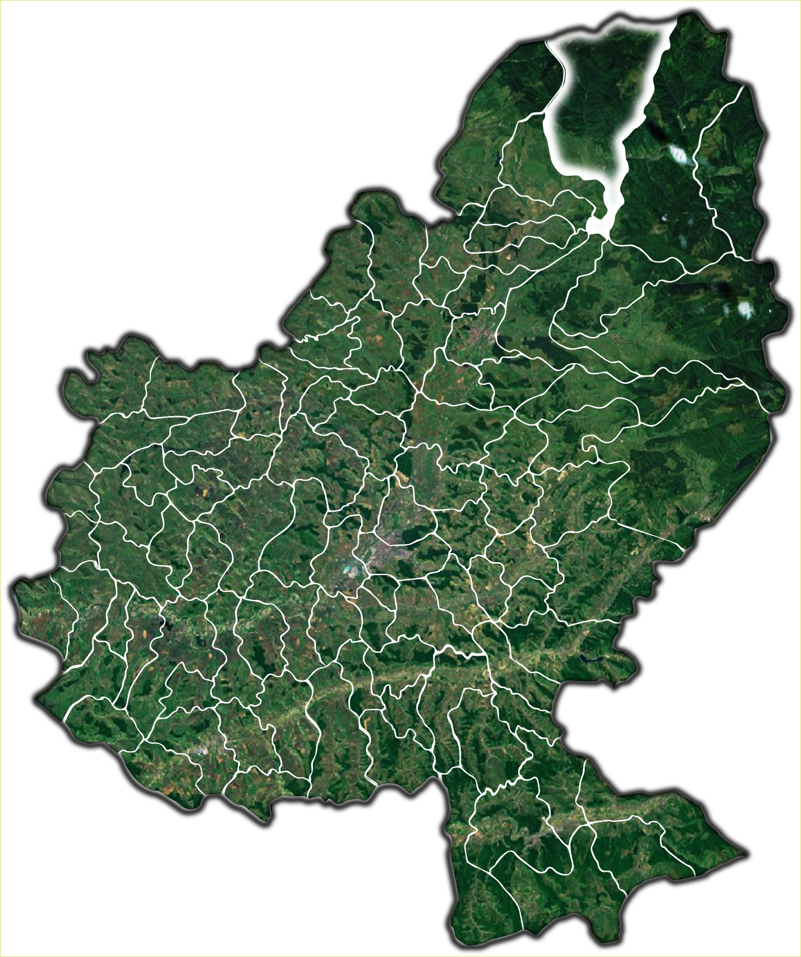 Rastolita jud Mures.